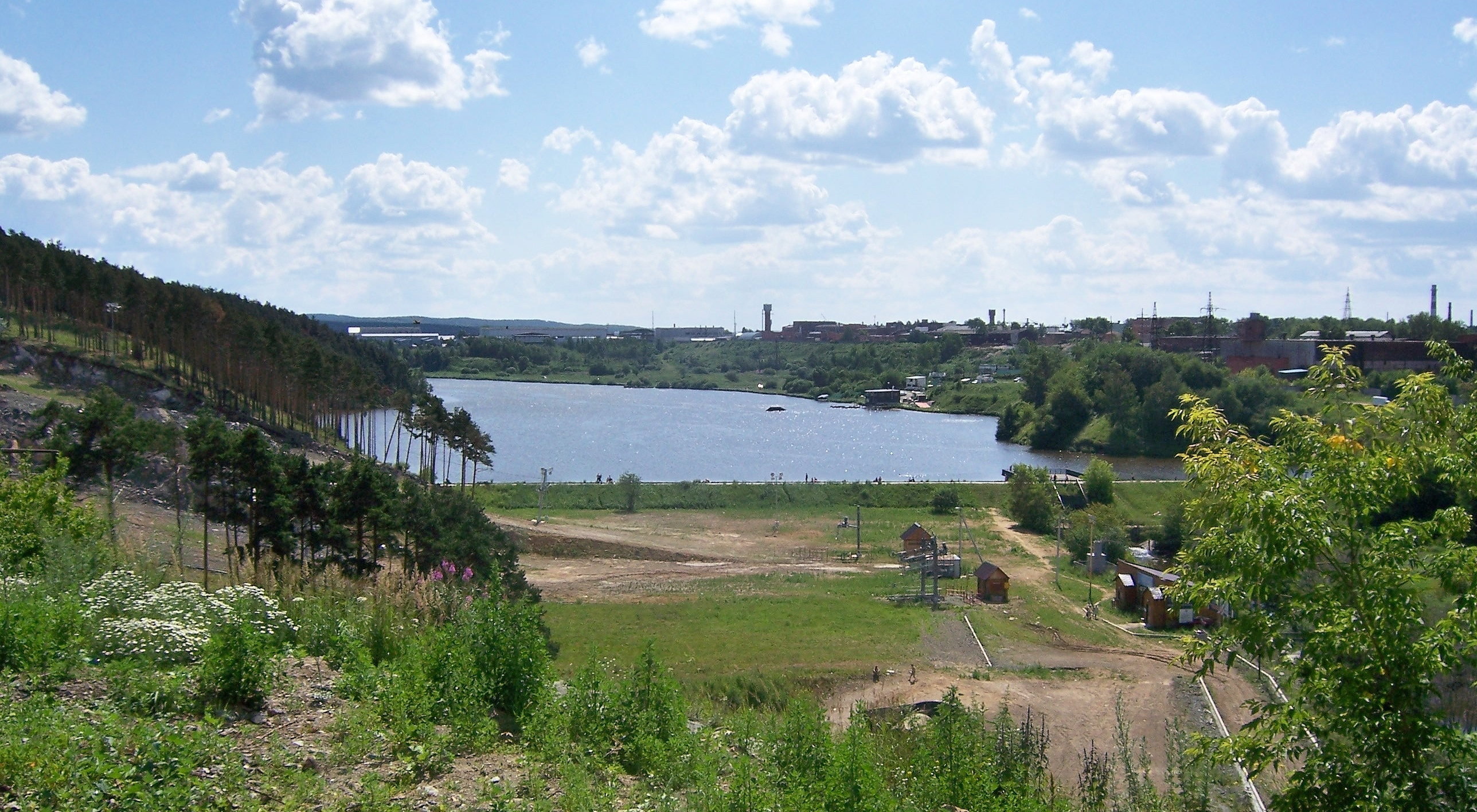 Плотина и водохранилище в микрорайоне Елизавет на правом притоке Исети — реке Патрушиха